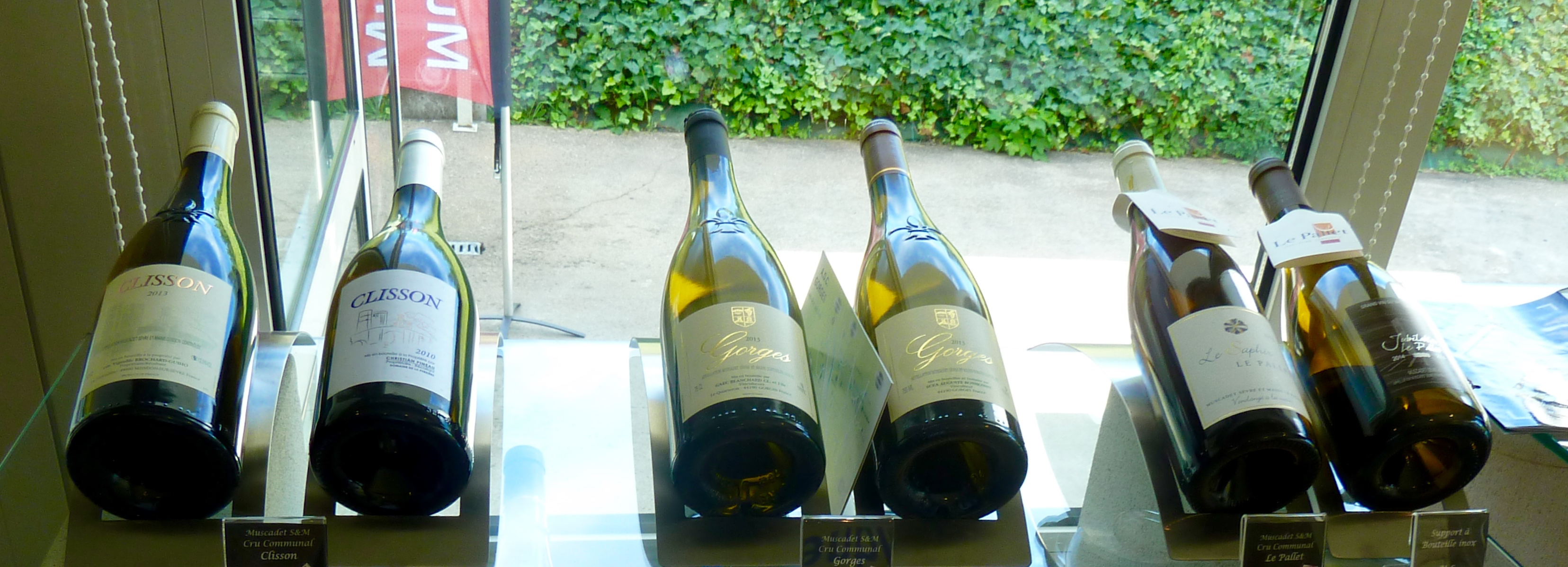 Muscadet Cru Communal dans le Musée du Vignoble Nantais.